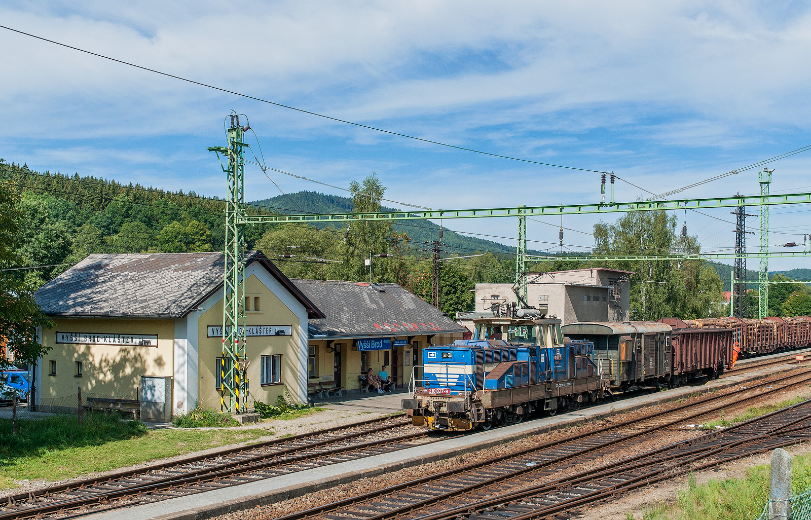 Elektrická lokomotiva 210.027 ČD Cargo při manipulaci s nákladními vozy ve stanici Vyšší Brod klášter.